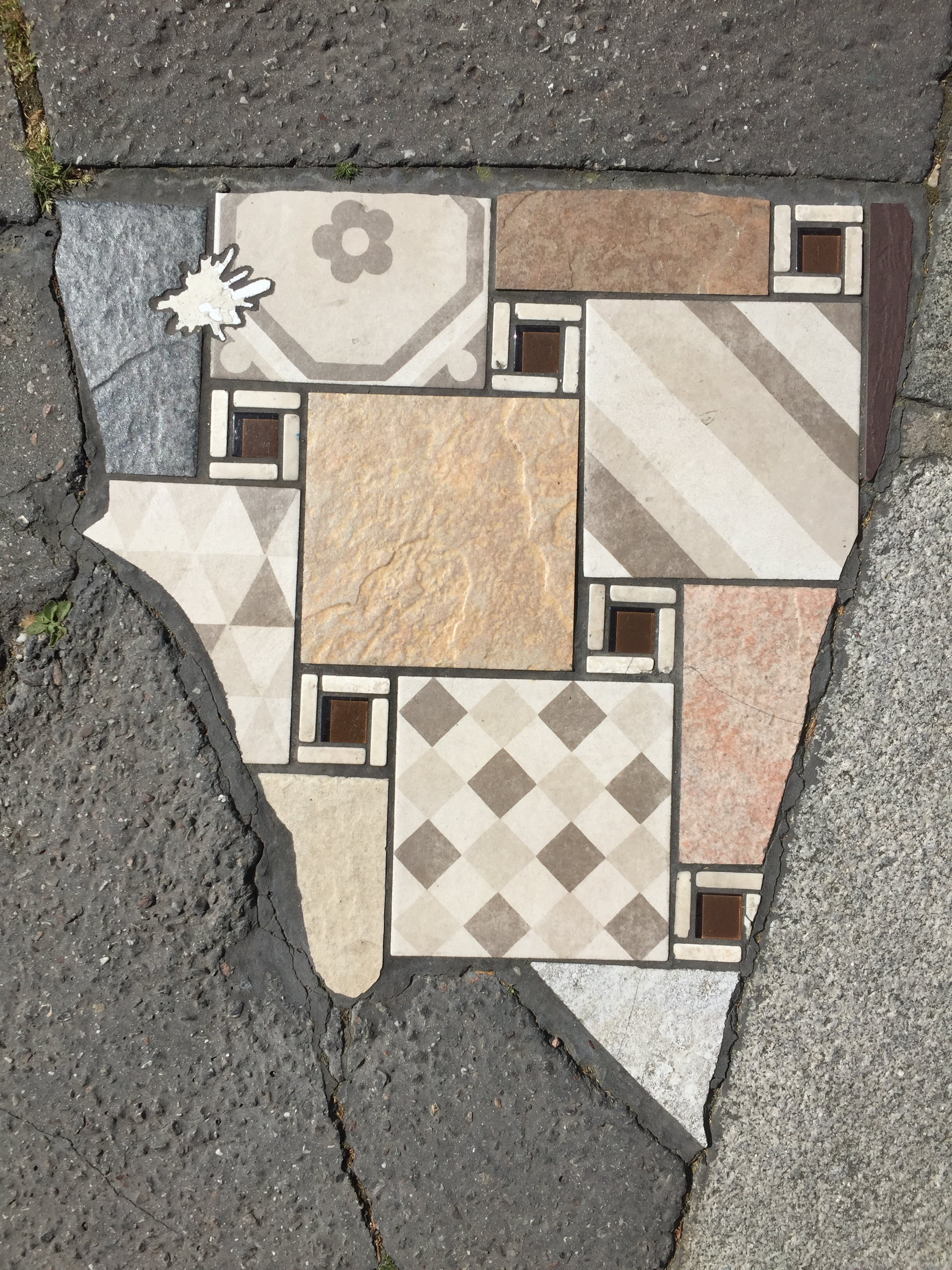 Œuvre du street-artiste Ememem, à Lyon : inclusion de mosaïques dans la chaussée.